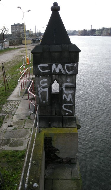 Pozostałości Mostu Dworcowego na Kępie Parnickiej (wieżyczka południowa), Szczecin